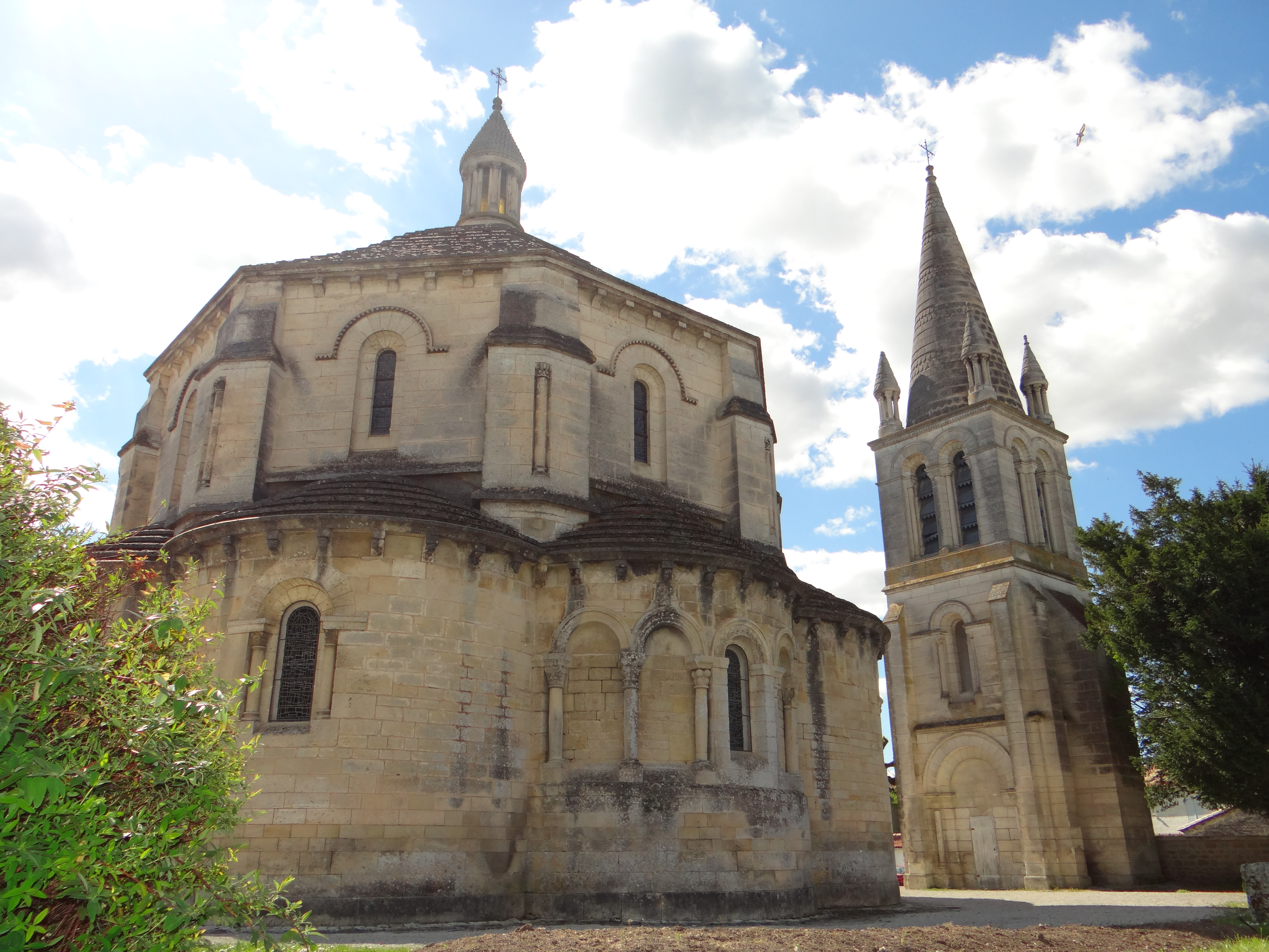 Église de Saint-Michel (Classé) .